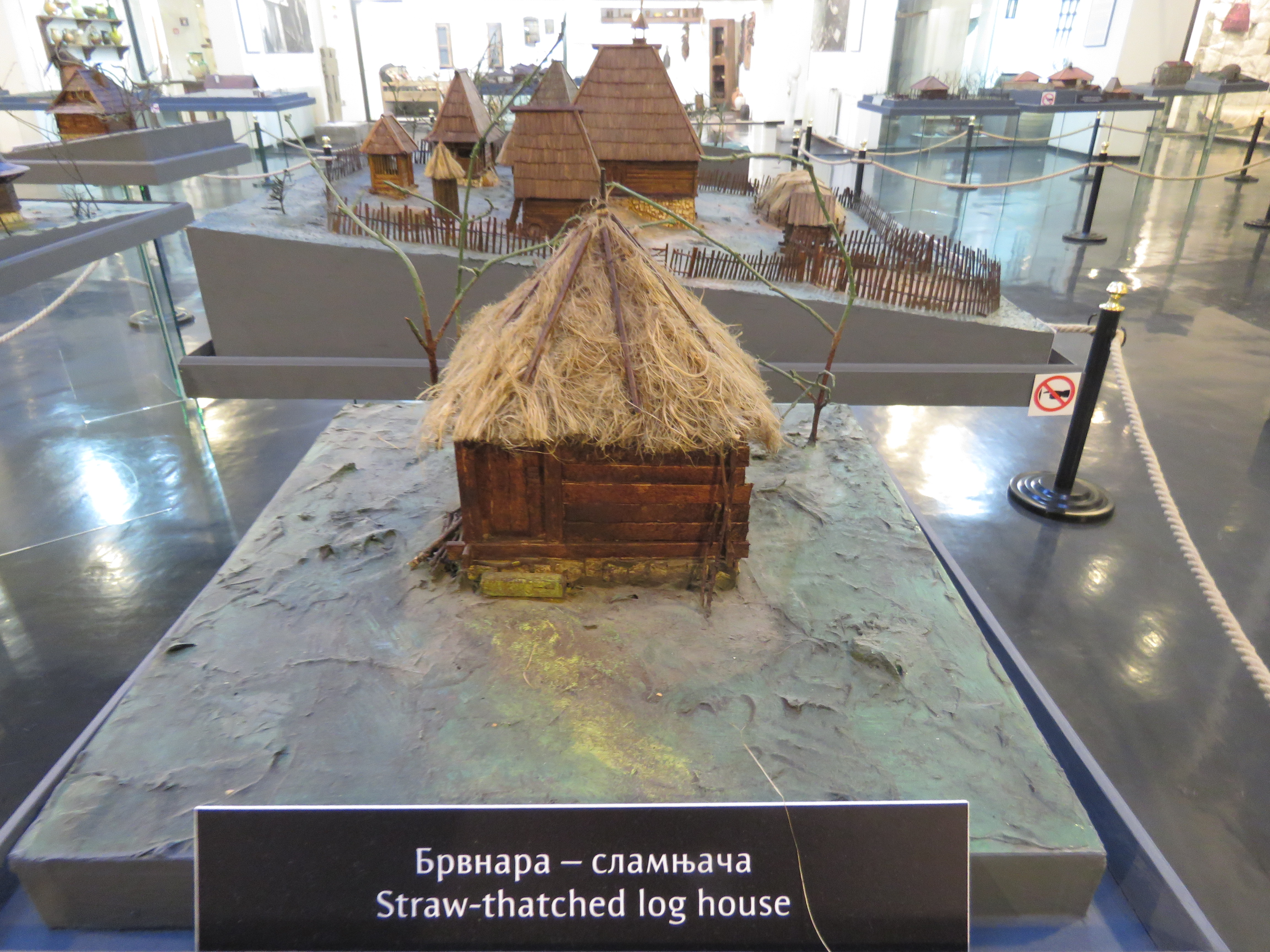 Maketa građevina u Etnografskom muzeju u Beogradu